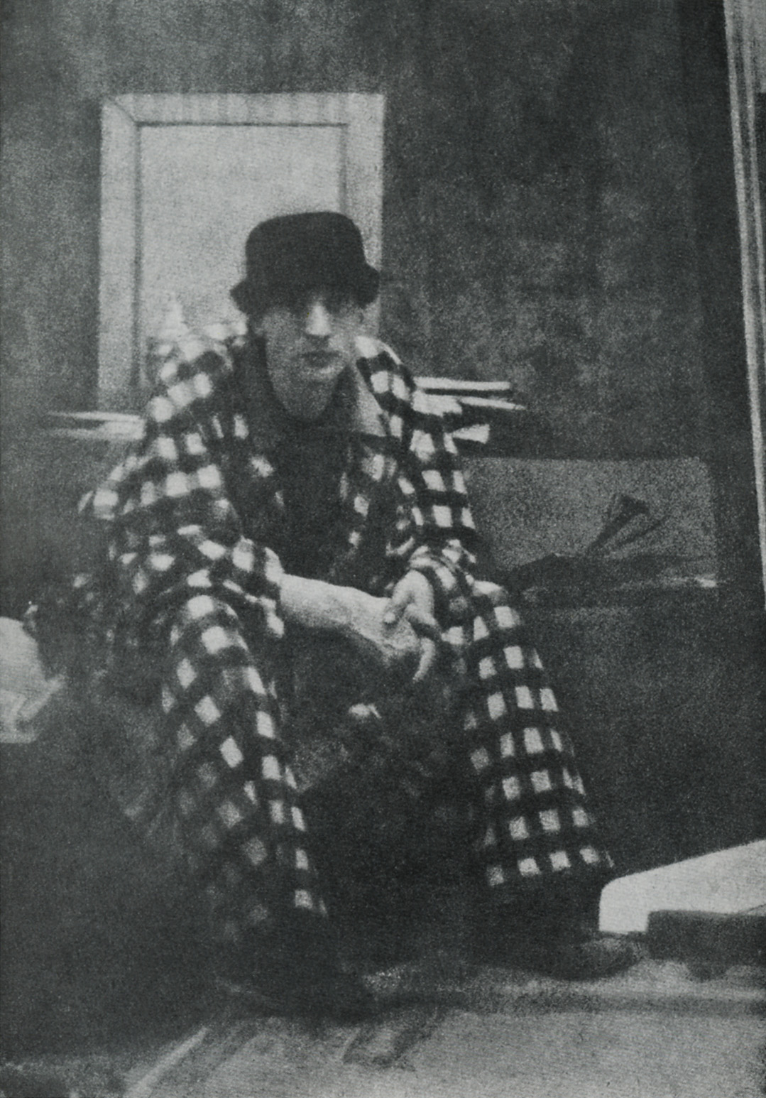 Photo of the painter Santa-Rita Pintor (1889 — 1918) published in "Portugal Futurista" magazine, 1917.